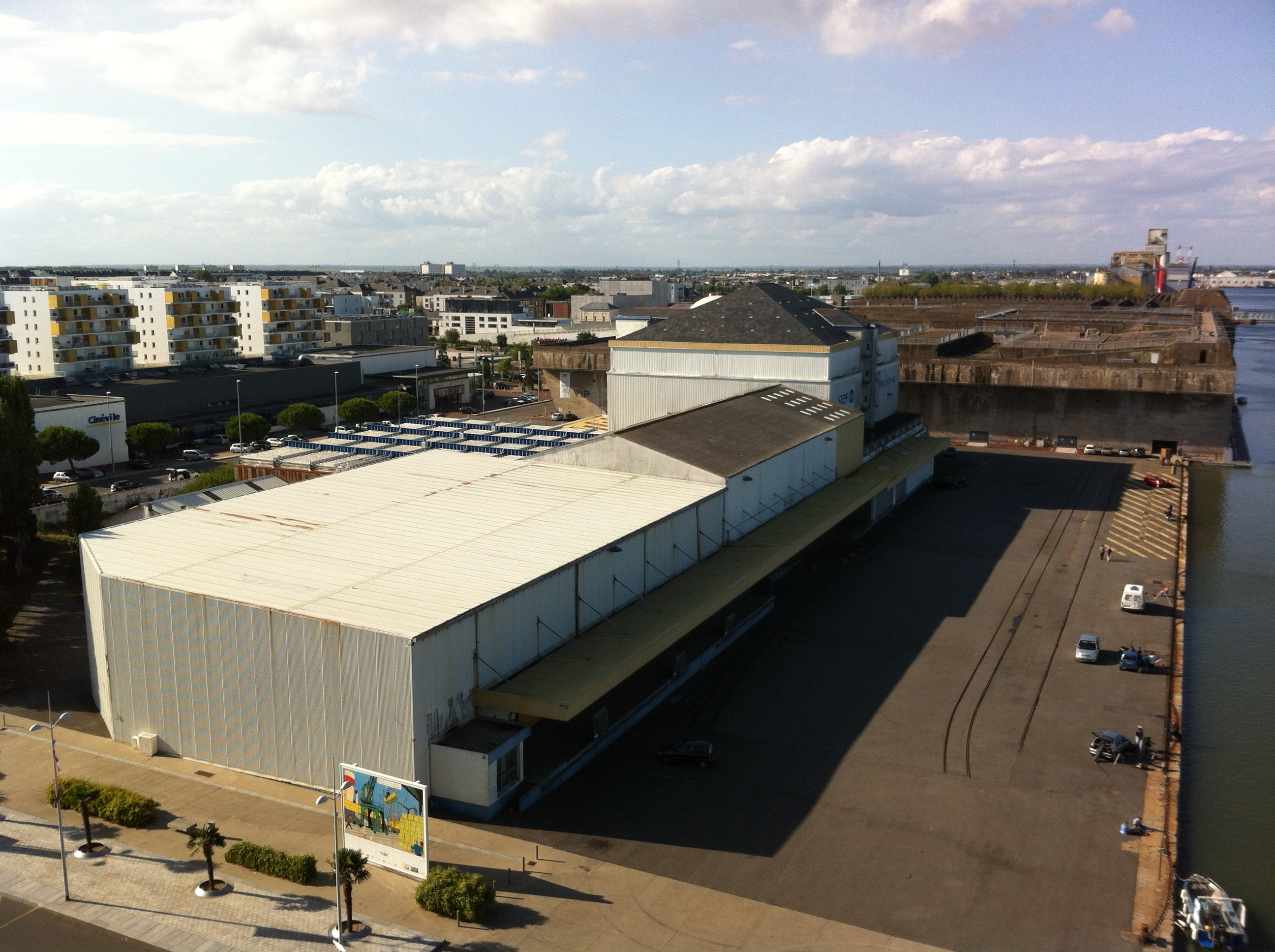 Base sous-marine - photo prise du 9ème étage - Quai René Coty